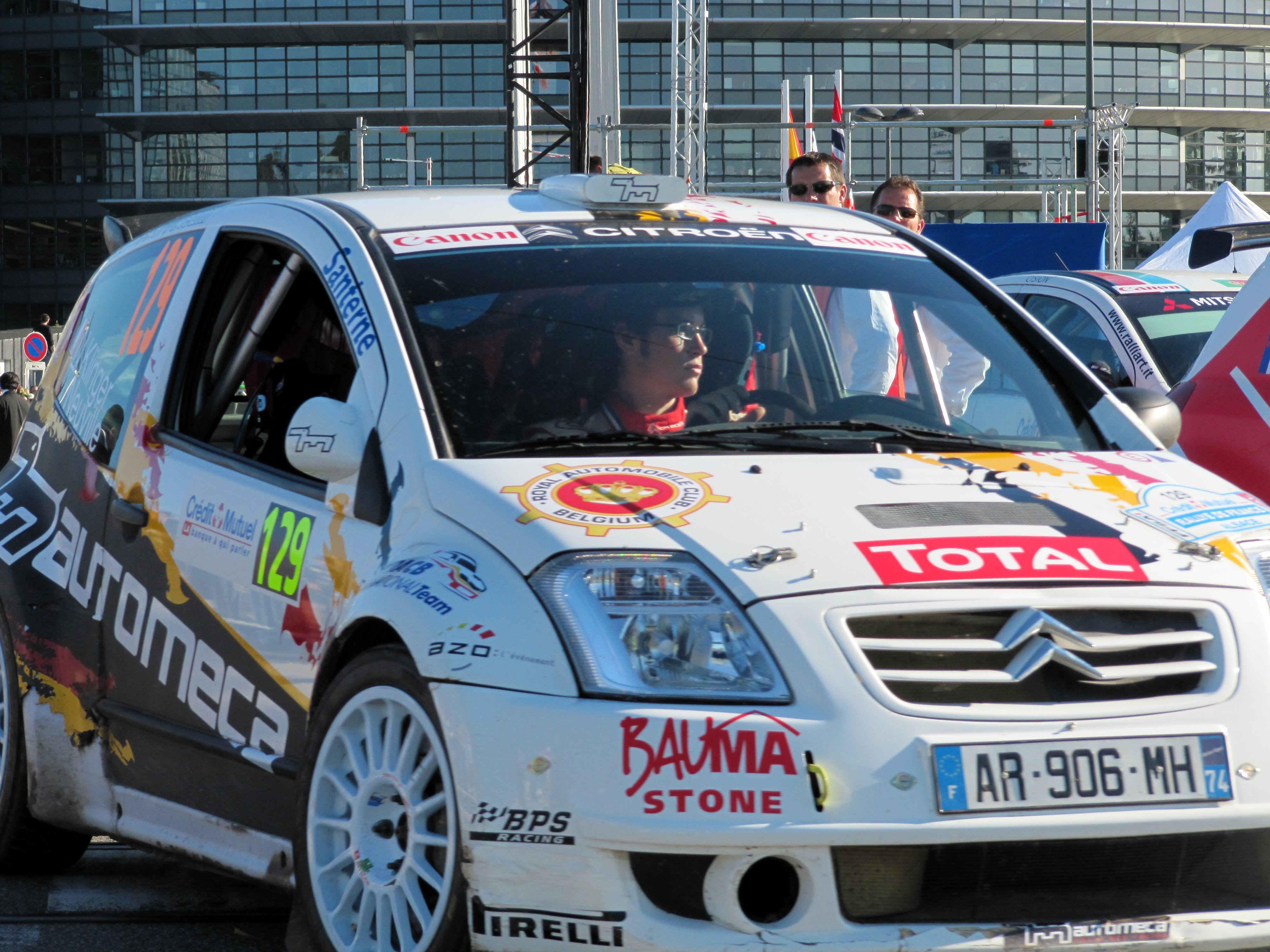 Thierry Neuville Rally Francia Alsace 2010